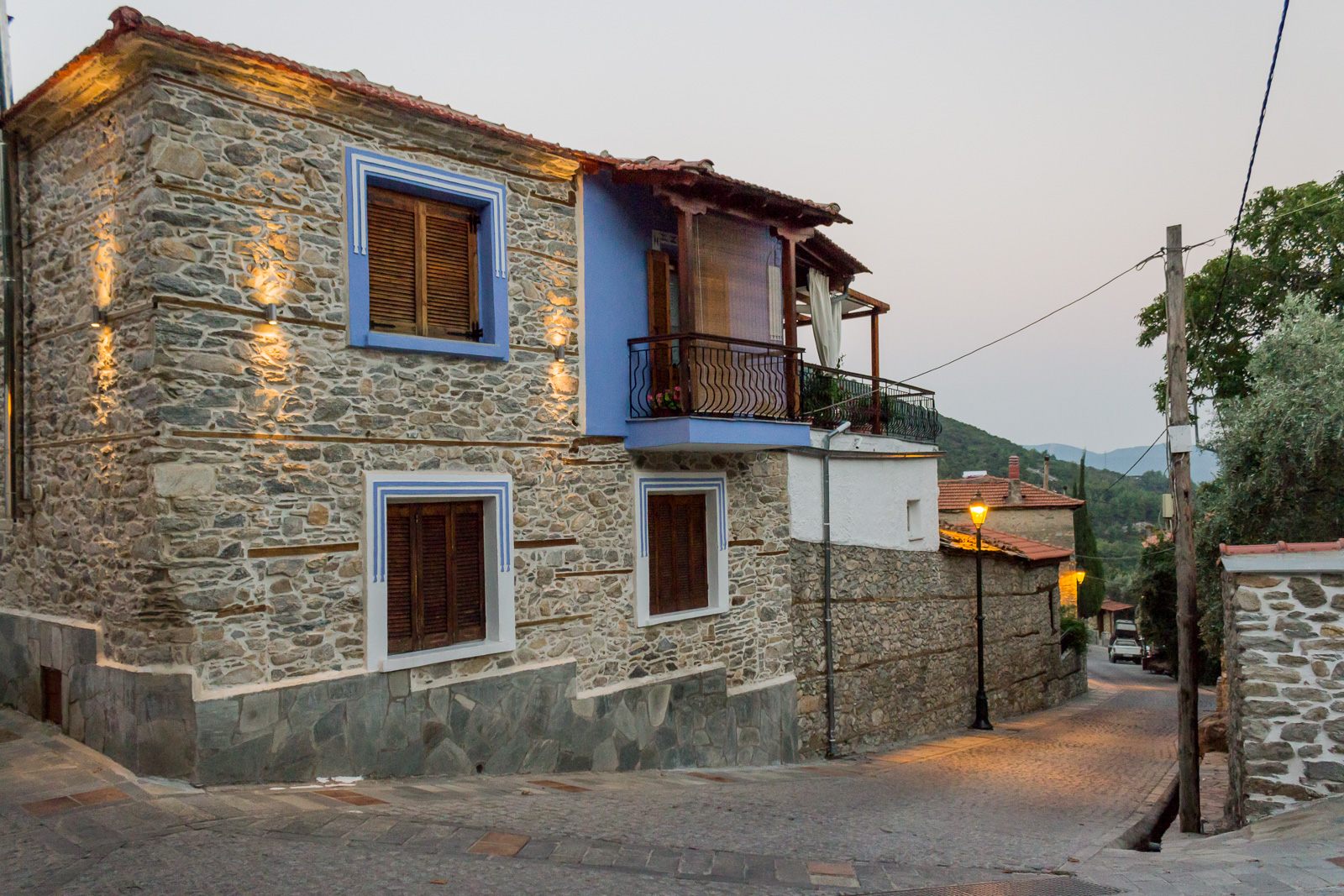 Μεσορόπη (παραδοσιακός οικισμός)«Μεσορόπη Καβάλας»